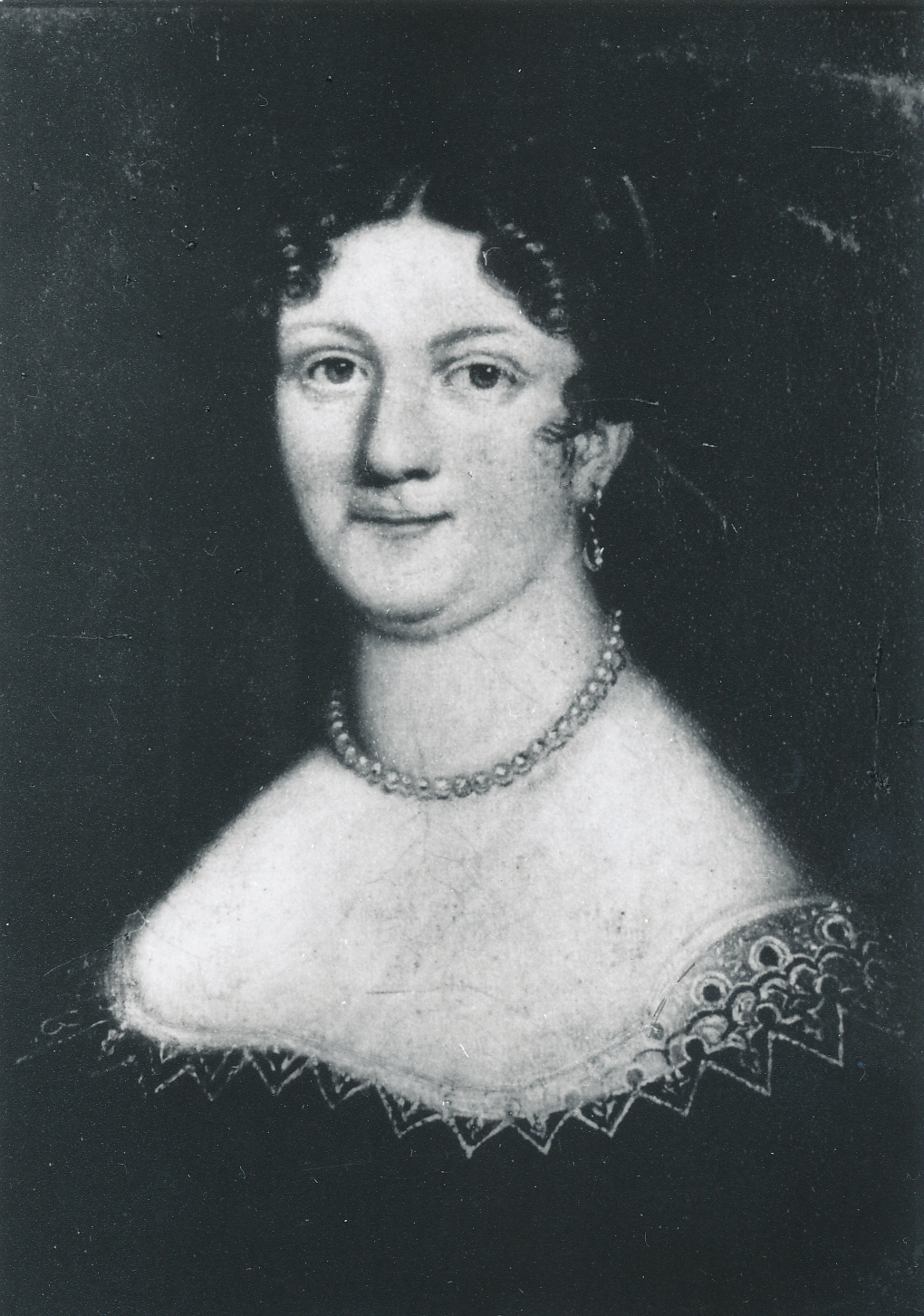 Sophie von Plessen, geb. Freiin von Campenhausen (Orellen / Livland) Datum: um 1805 Urheber: unbekannter Portaitmaler Quelle: privates Fotoalbum der eigenen (mütterlichen) Familie